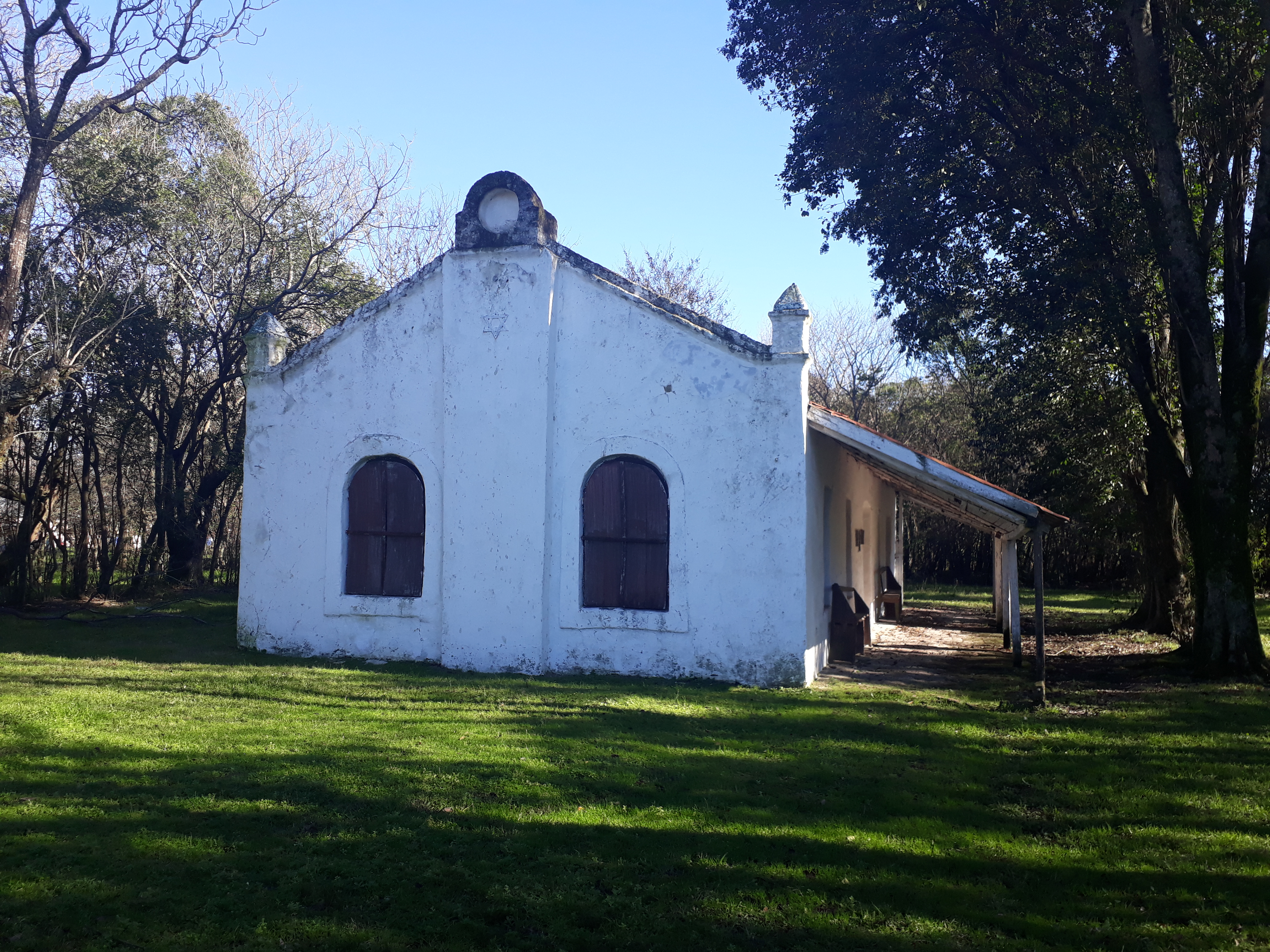 Sinagoga Novibuco 1. La primera sinagoga-rancho del país fundada en 1895, un año después de la instalación de la Colonia Lucienville. Cerca de Basavilbaso.